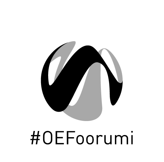 OEF somelogo